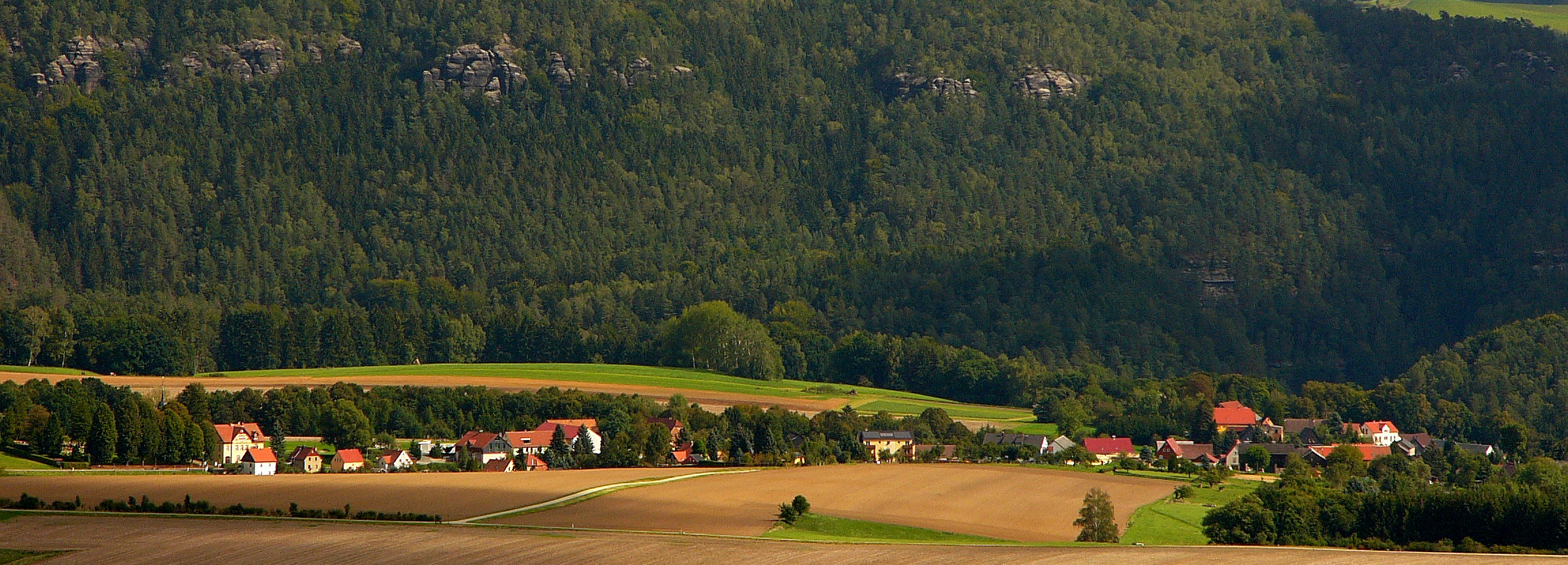 Panorama von Porschdorf in der Sächsischen Schweiz